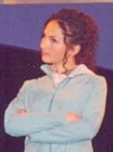 Andrés Wood, Aline Küpenheim y Manuela Martelli; premiación pelicula Machuca; año 2004